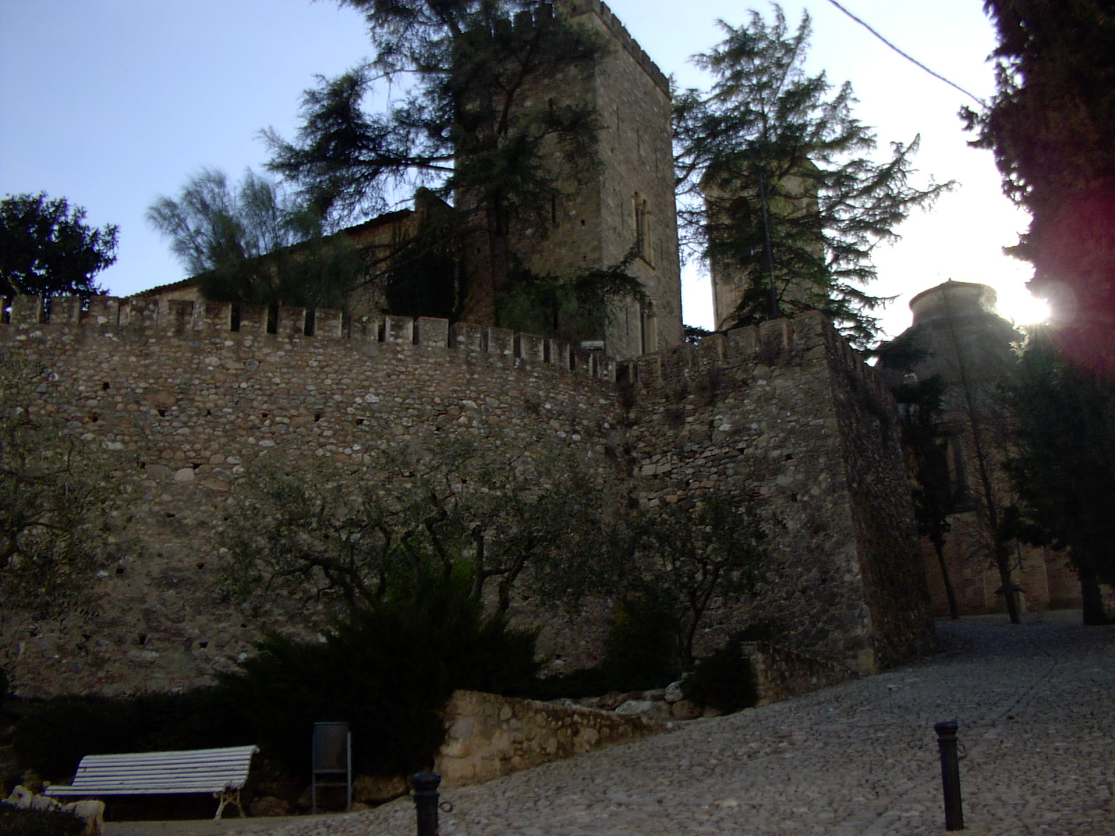 Jaume I subió a rodillas por esta cuesta del castillo de Piera al cumplir la promesa hecha antes de tomar Mallorca. El castillo de Piera era residencia habitual del rey Jaume I, hasta que lo donó al monasterio de Pedralbes pasando posteriormente por varias familias como los Cardona, Çercorts y los Viala. En la actualidad es de propiedad privada.